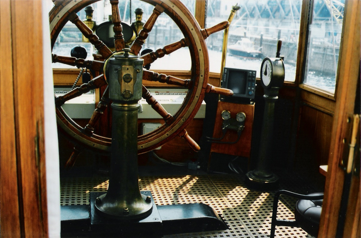 Vista della Plancia del Piroscafo a Pale Piemonte